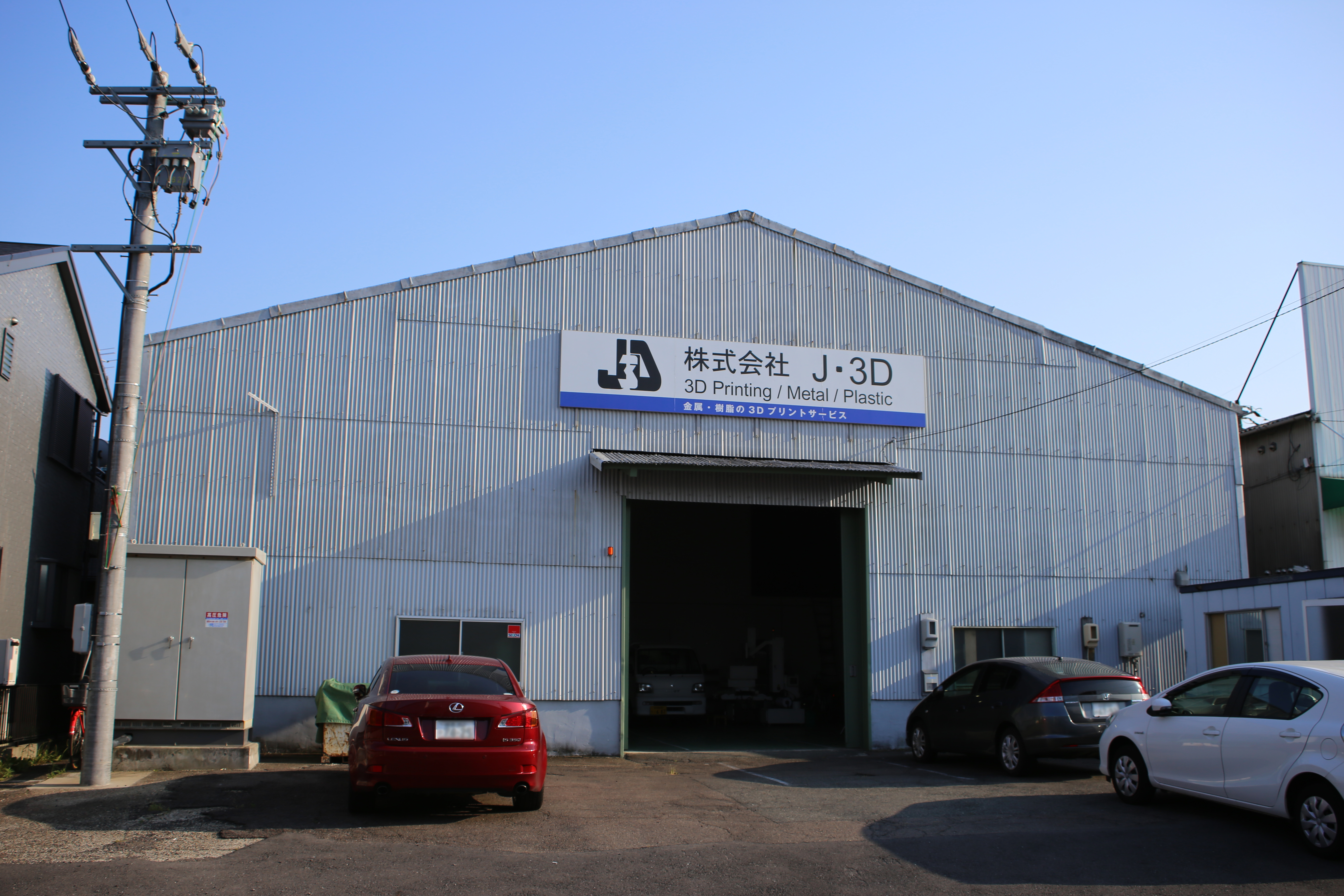 名古屋市港区油屋町のJ3D本社を北側公道東側より撮影。ただし、ナンバープレートにつき画像処理済。